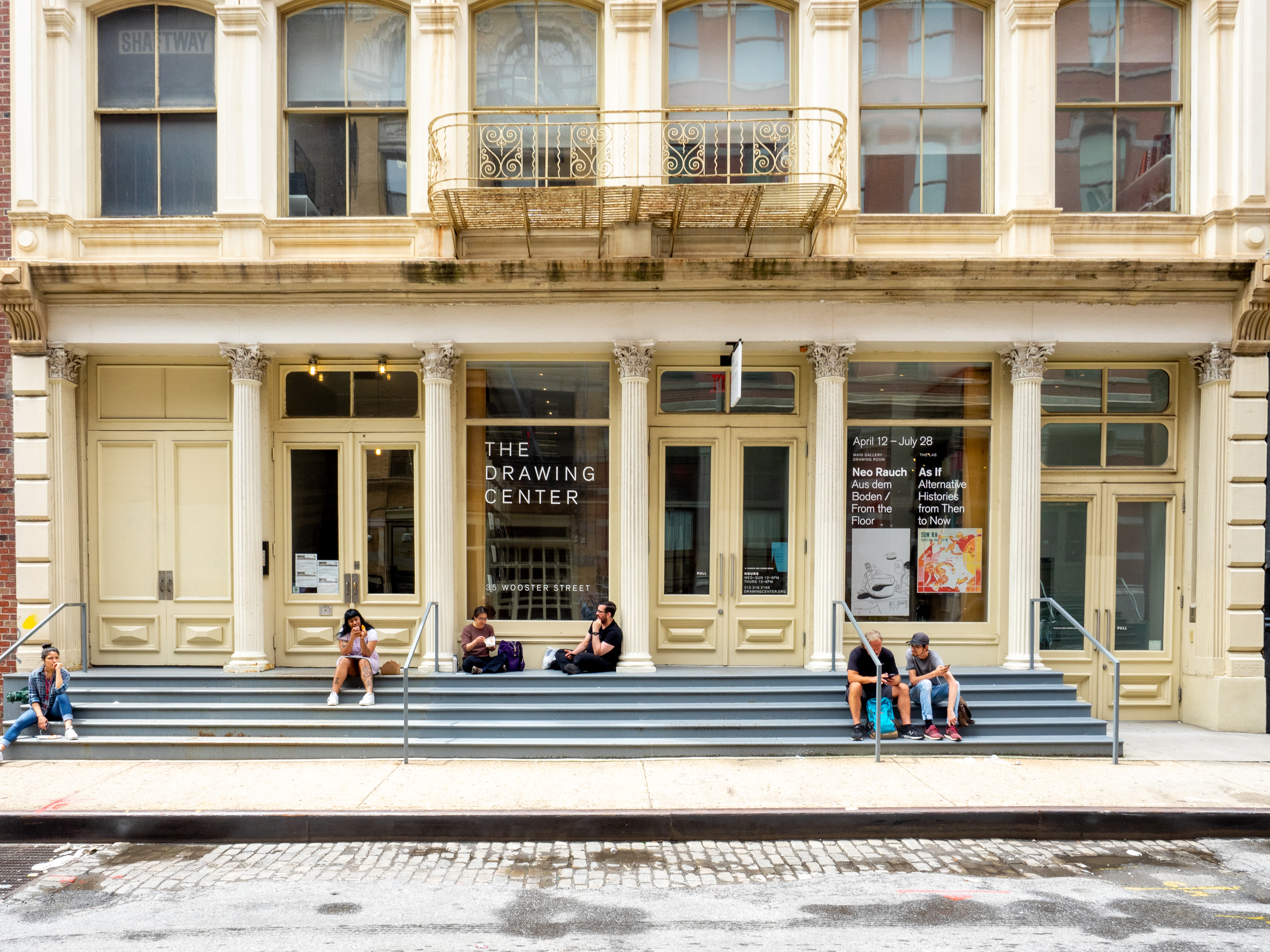 SoHo, NYC